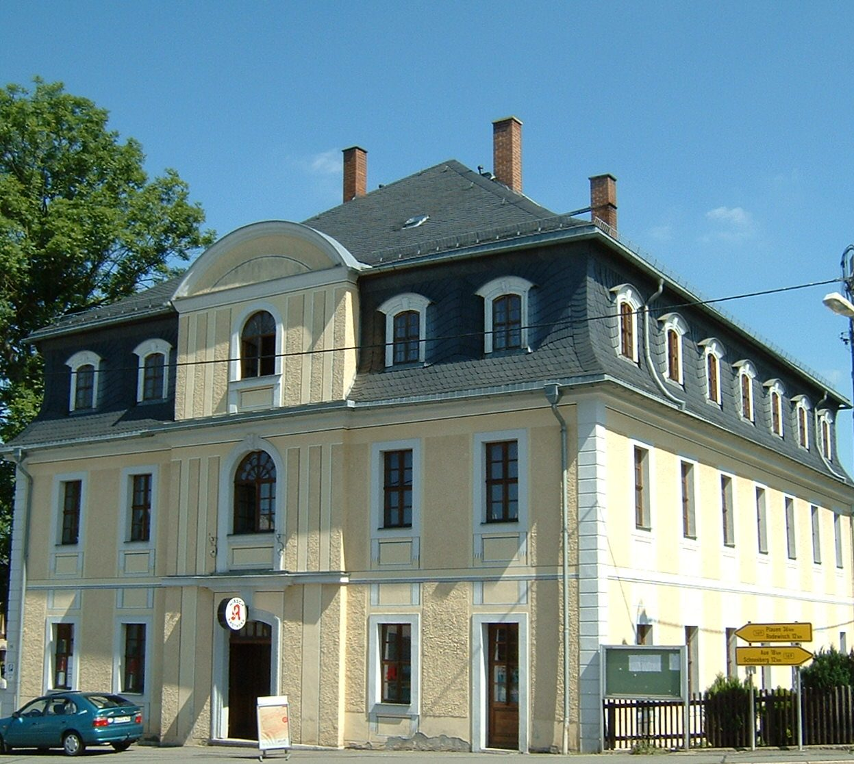 Stützengrün im Erzgebirge, Großes Haus, Barockgebäude 17. Jh.